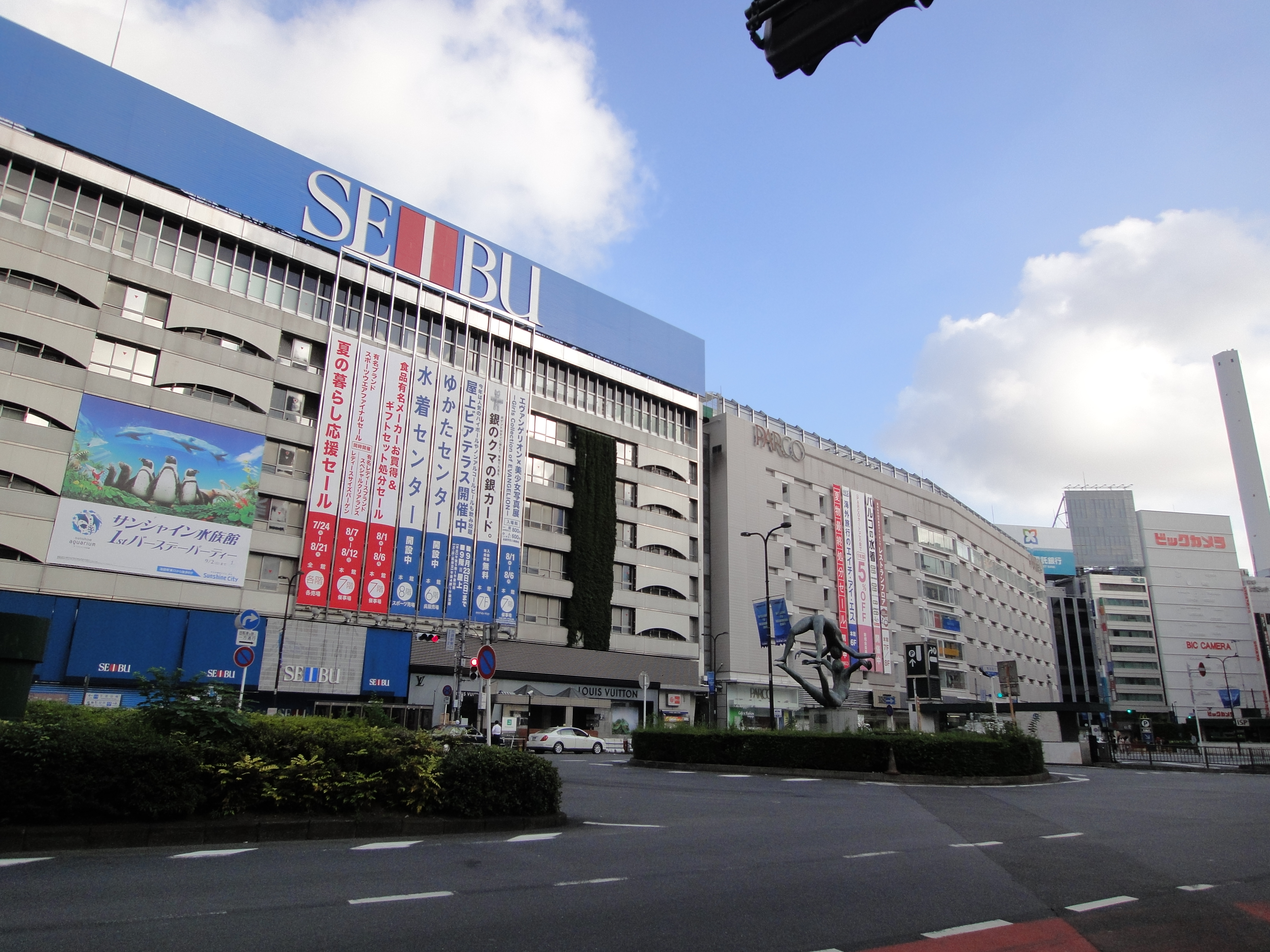 池袋駅東口 2012年8月5日